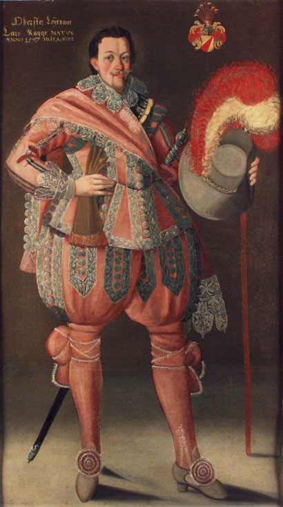 Lars Kagg (1595-1661)